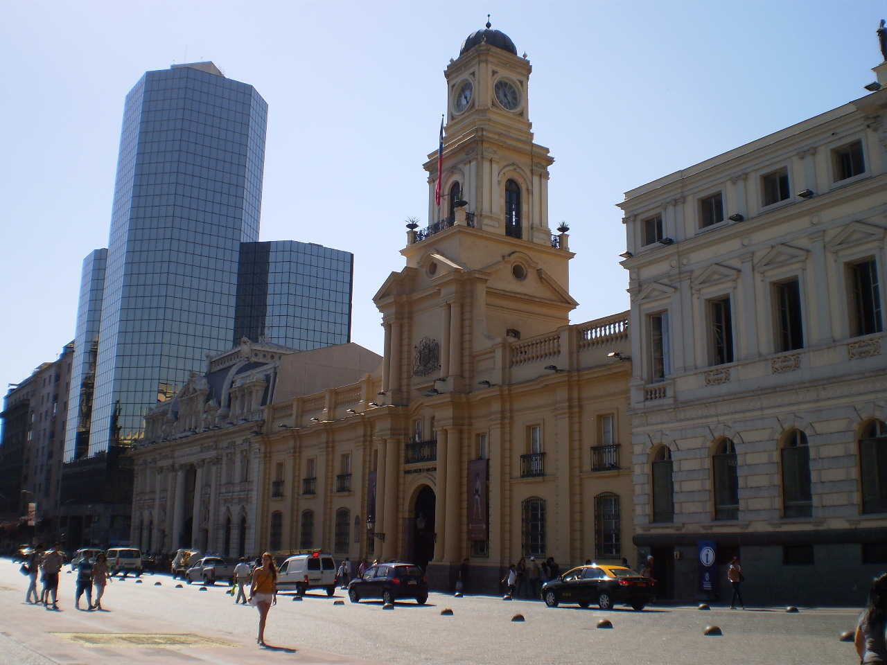 El Palacio de la Real Audiencia y Cajas Reales (Palacio de la Real Audiencia o Palacio de las Cajas) o Palacio de la Independencia, es un edificio ubicado en la vereda centro-norte de la Plaza de Armas de Santiago de Chile que data de 1808 y que alberga, desde 1982, la sede del Museo Histórico Nacional de Chile.